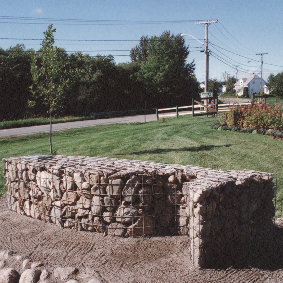 Il s'agit du Tacon-Site des Semences réalisé par le duo d'artistes Interaction Qui (A. Laroche et J. Maltais) en 2005. C'est le troisième Tacon-Site réalisé dans le cadre du projet Événement-Ouananiche. Il porte le numéro 03 et appartient à la Municipalité de Lac-à-la-Croix (Lac-Saint-Jean, Québec, Canada).